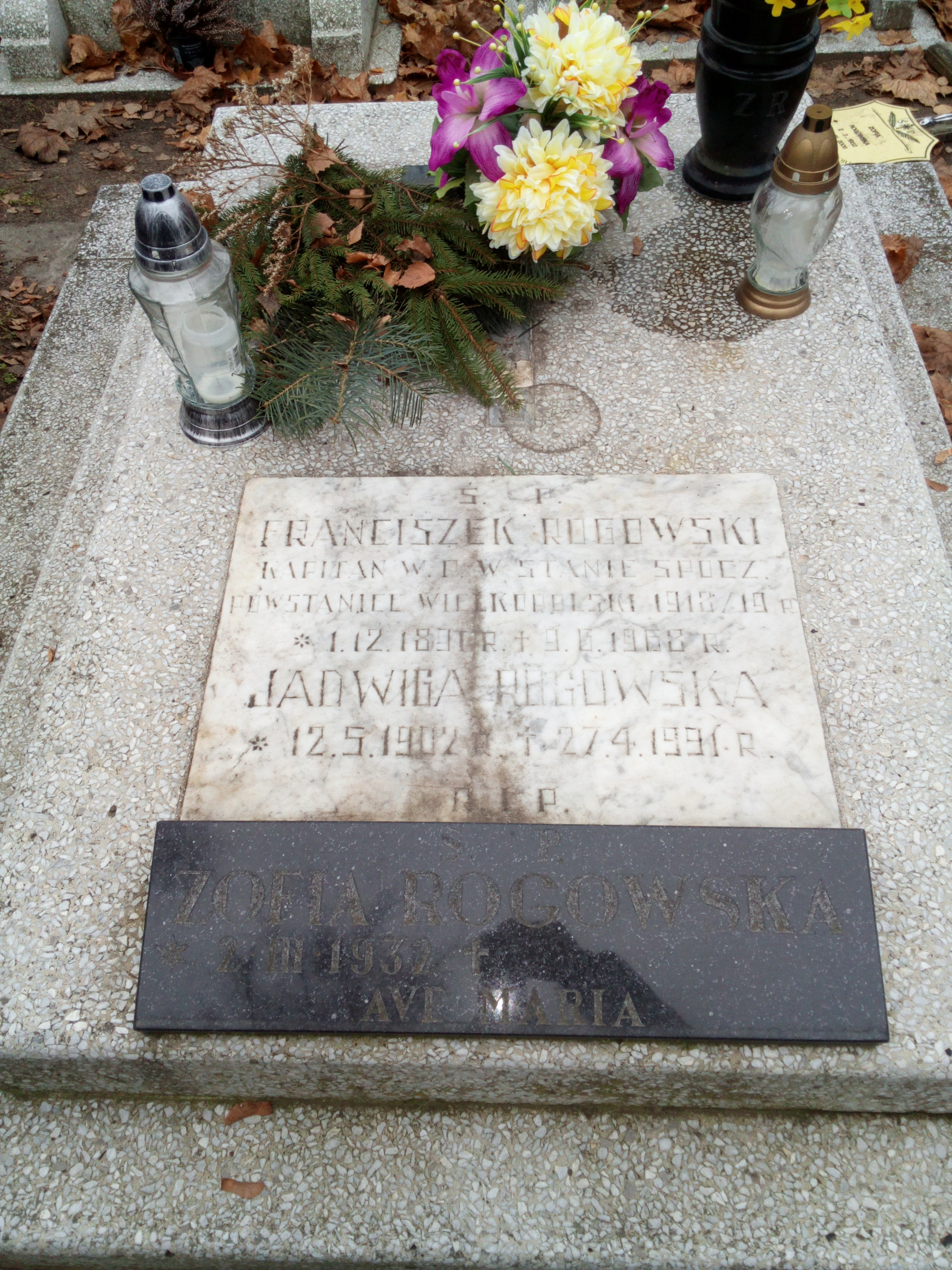 Grób kpt. Franciszka Rogowskiego - kierownika II referatu uzupełnień KRU Włocławek (cmentarz komunalny we Włocławku).